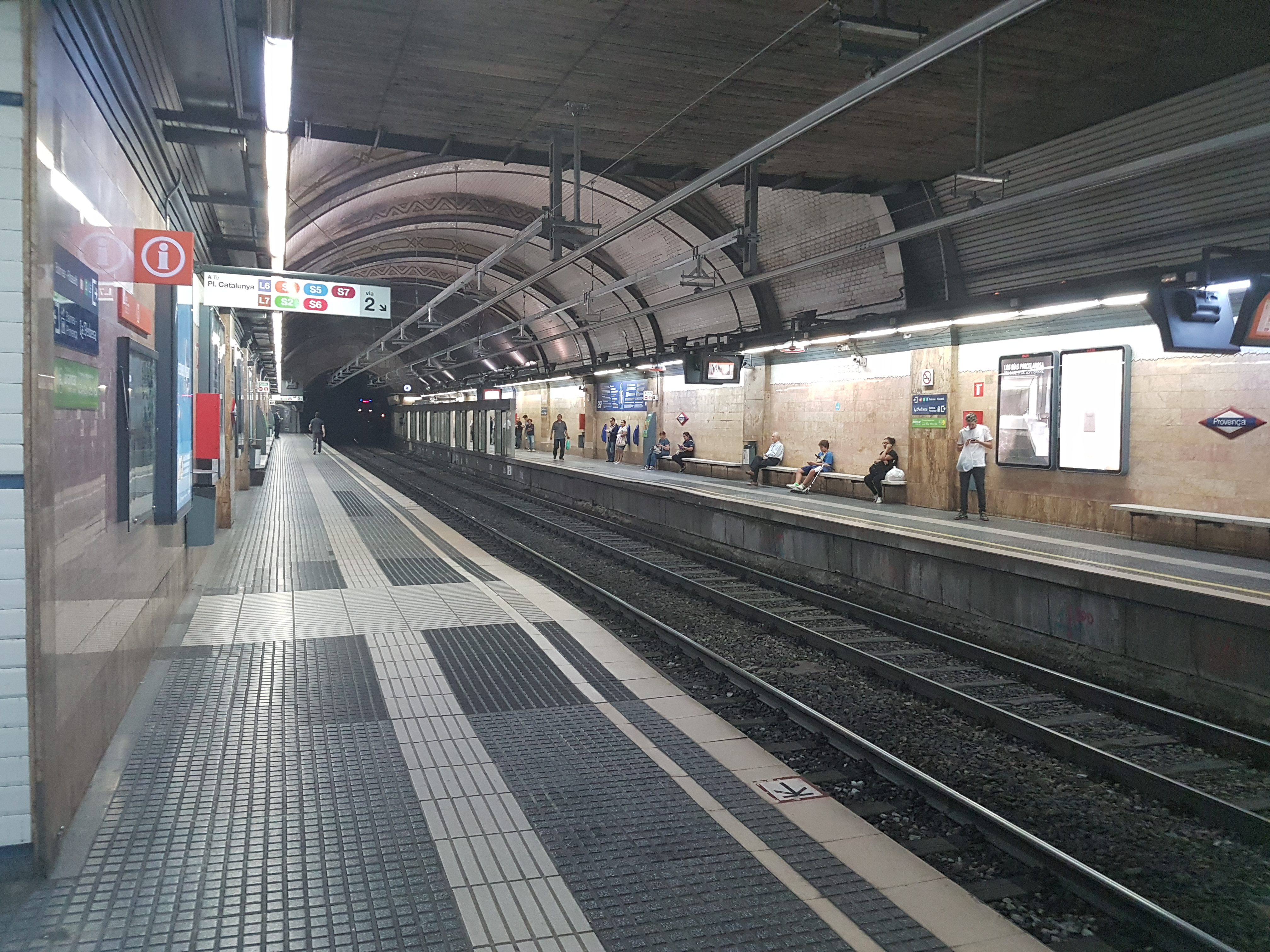 Estació de Provença de la línia Barcelona-Vallès de FGC